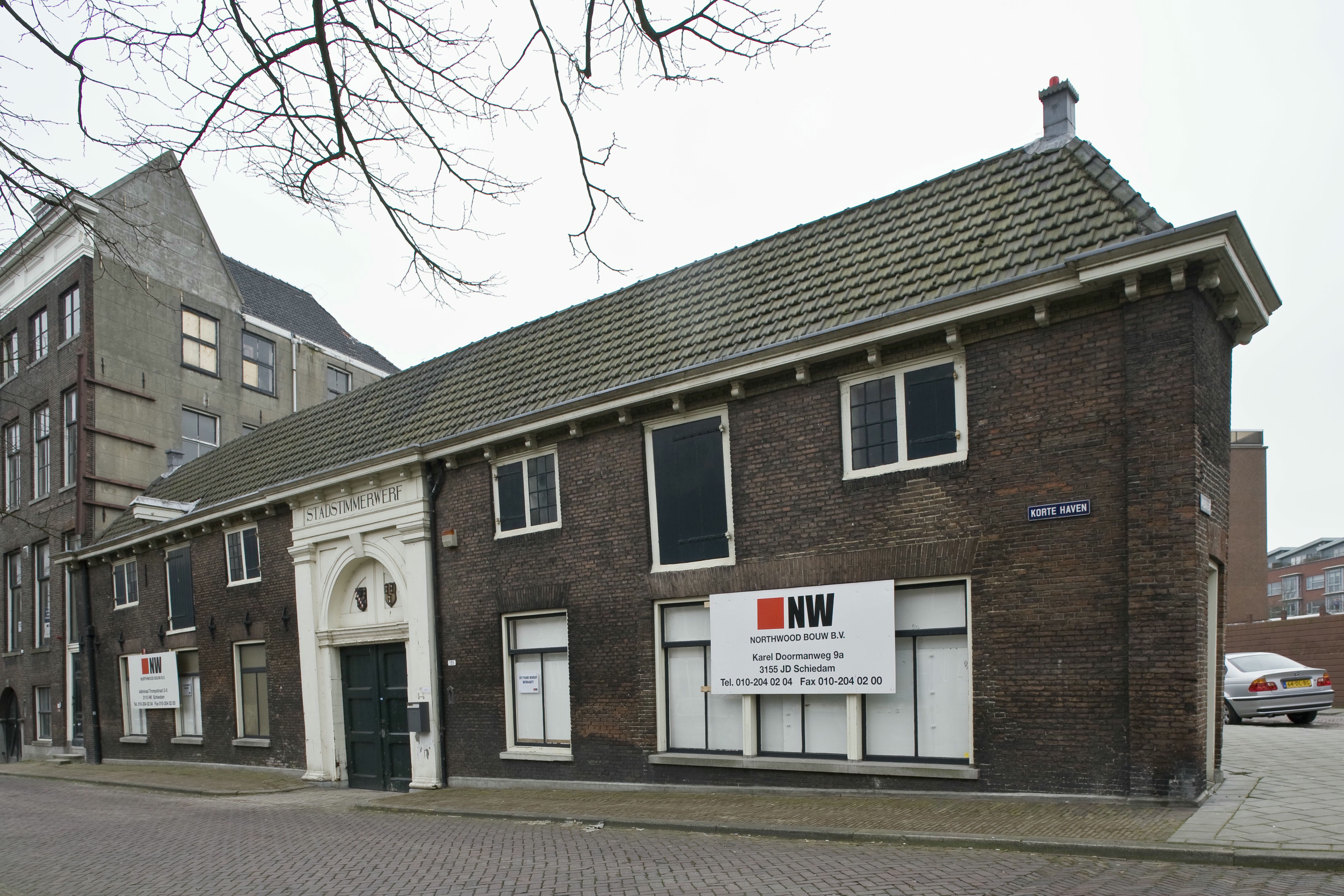 Stadstimmerwerf: Overzicht van voorgevel